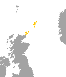 Islas en las que se hablaba históricamente el idioma norm.